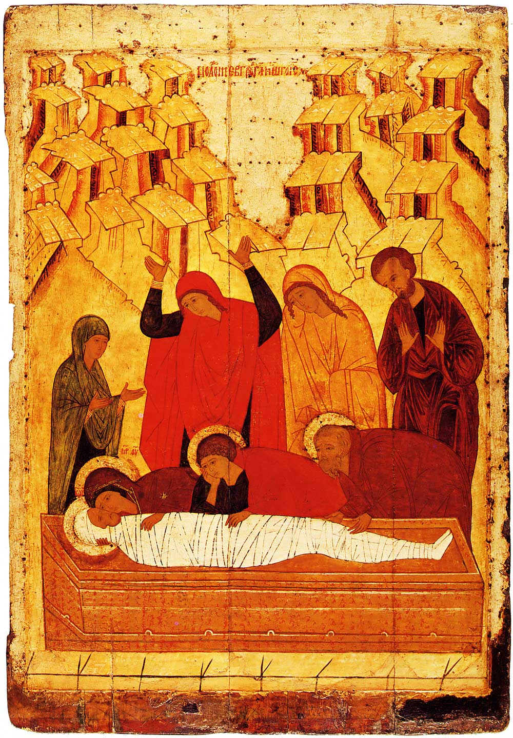 russian icon Entombment of Christ, = Tretiakov Gallery Положение во гроб Из праздничного чина Школа или худ. центр: Русский Север 90 × 63 см Государственная Третьяковская галерея, Москва, Россия Инв. 12041 Икона входила в состав праздничного чина из Городца.